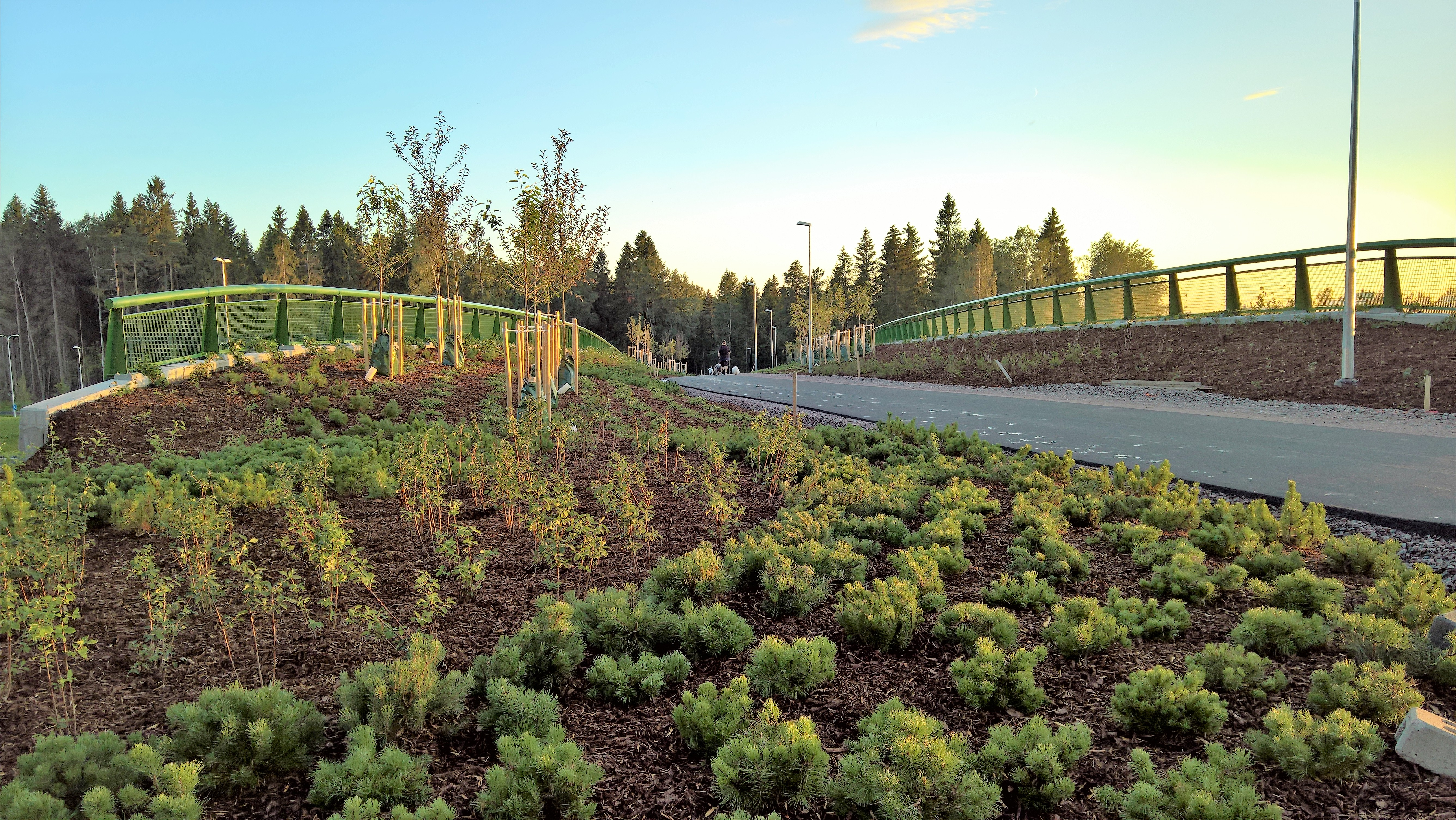 Kuva Helsingin Helsingin Viikin puistosillasta, joka valmistui elokuussa 2016